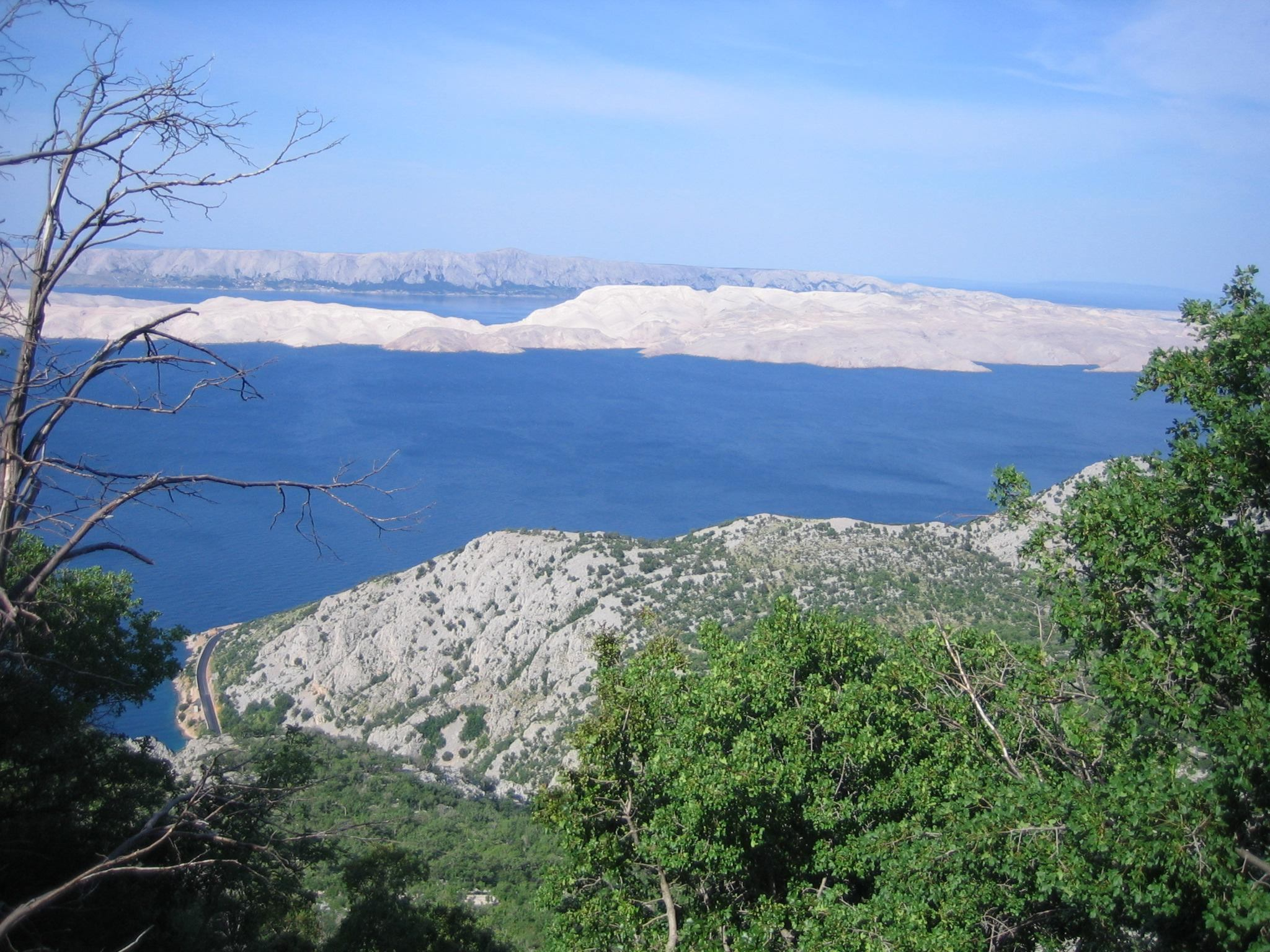 Blick vom Velebit-Massiv auf die Insel Pag.